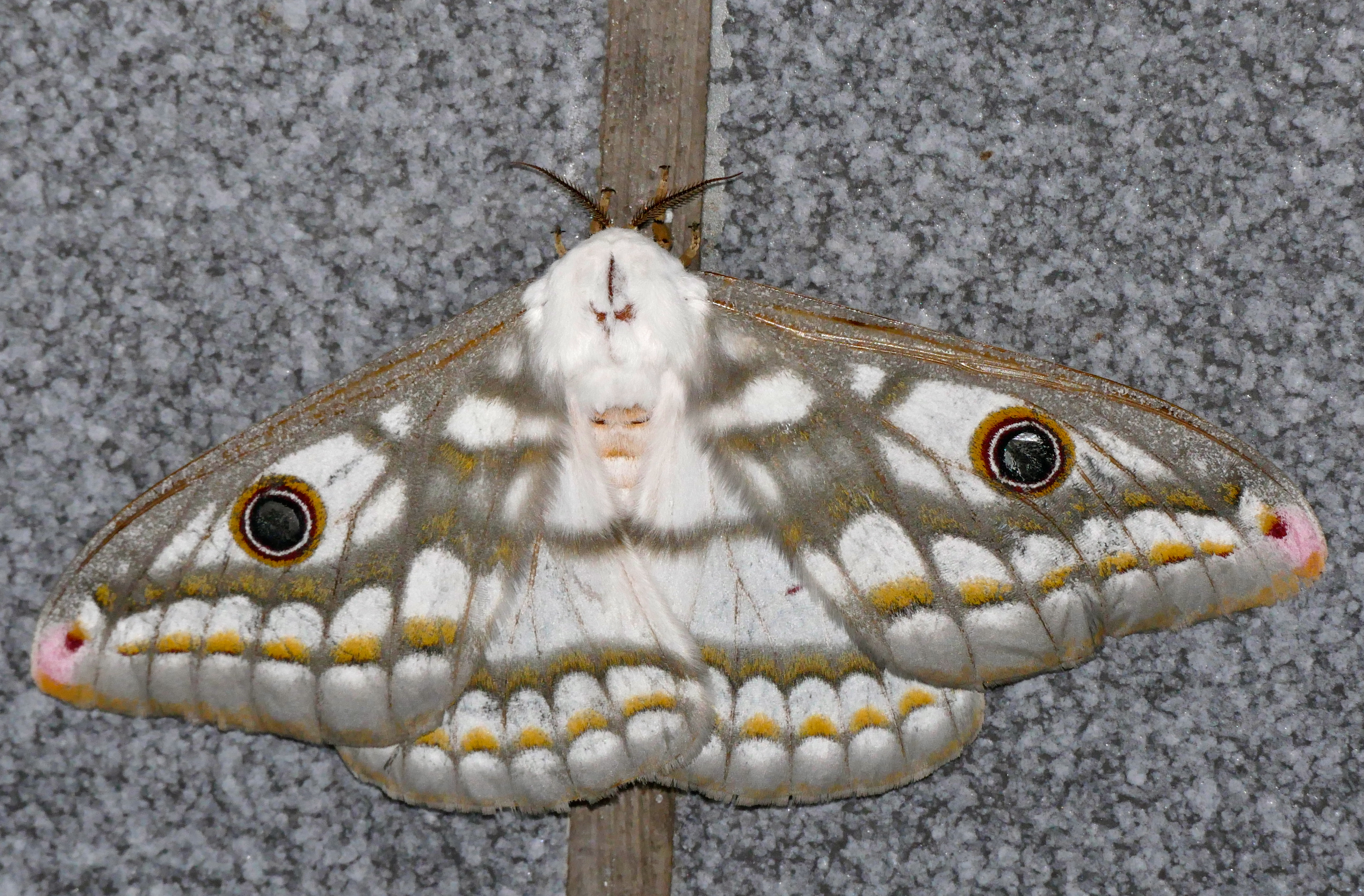 Lower Sabie Camp, Kruger NP, SOUTH AFRICA